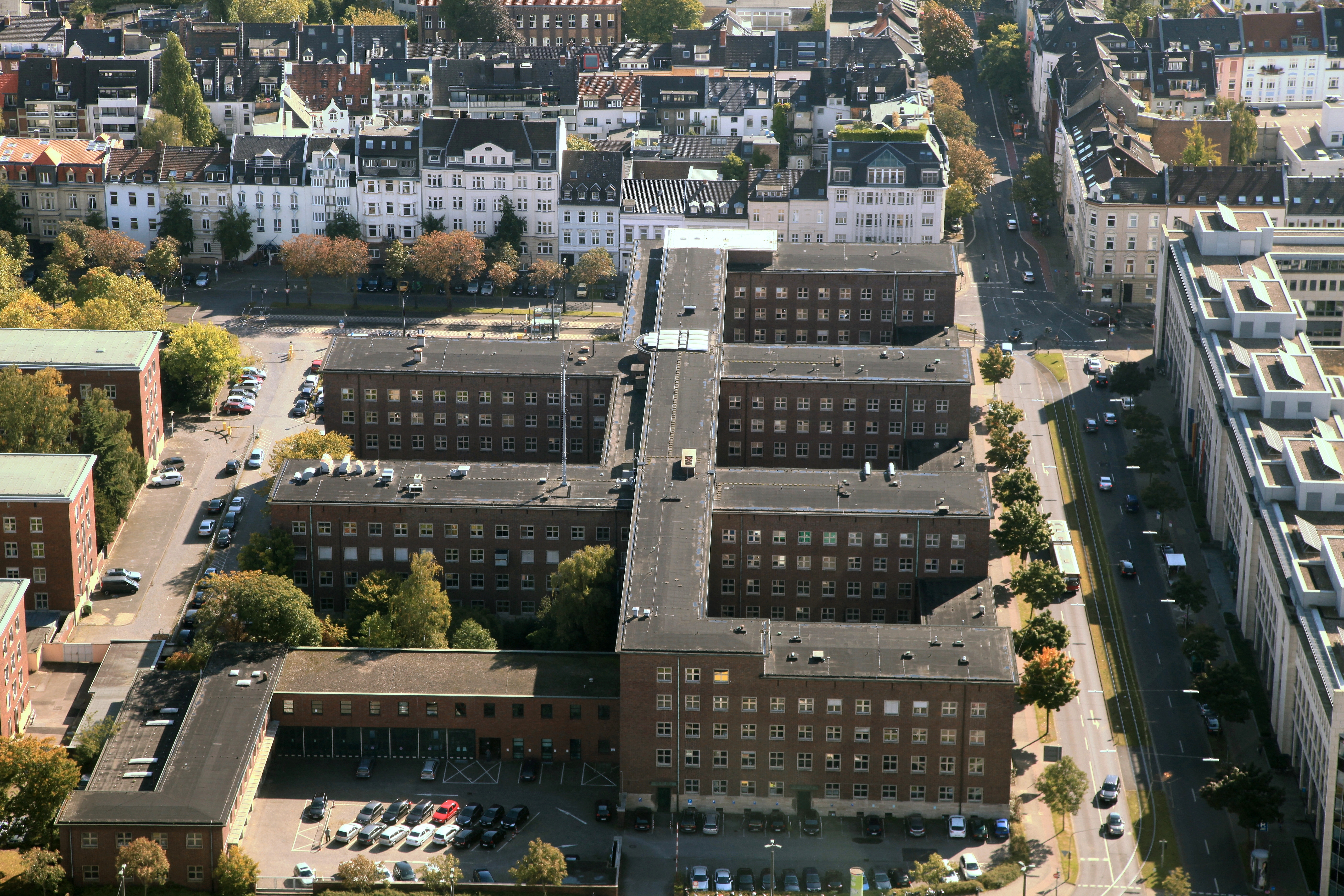 Blick vom Rheinturm zum Polizeipräsidium entlang des Fürstenwall, Anschrift Jürgensplatz 5, in Düsseldorf.